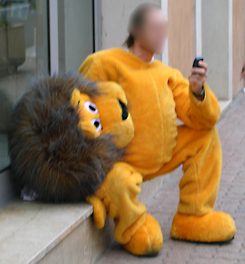 Mascot